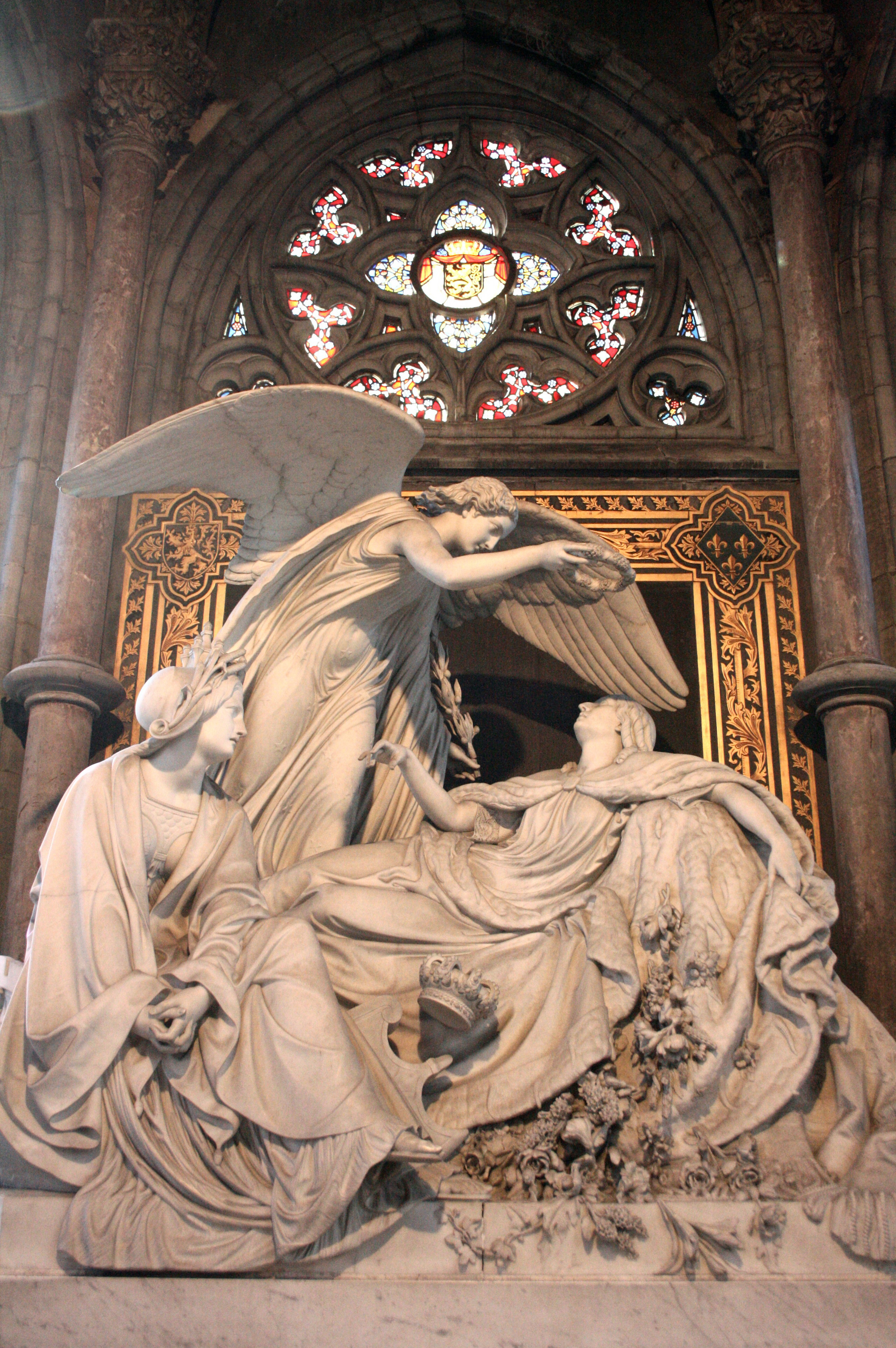 Sint-Petrus-en-Pauluskerk in Oostende (België). Neogotische kapel met praalgraf van koningin Louise-Marie. Monument van Carraramarmer. Werk van beeldhouwer Charles Auguste Fraikin (1817-1893)